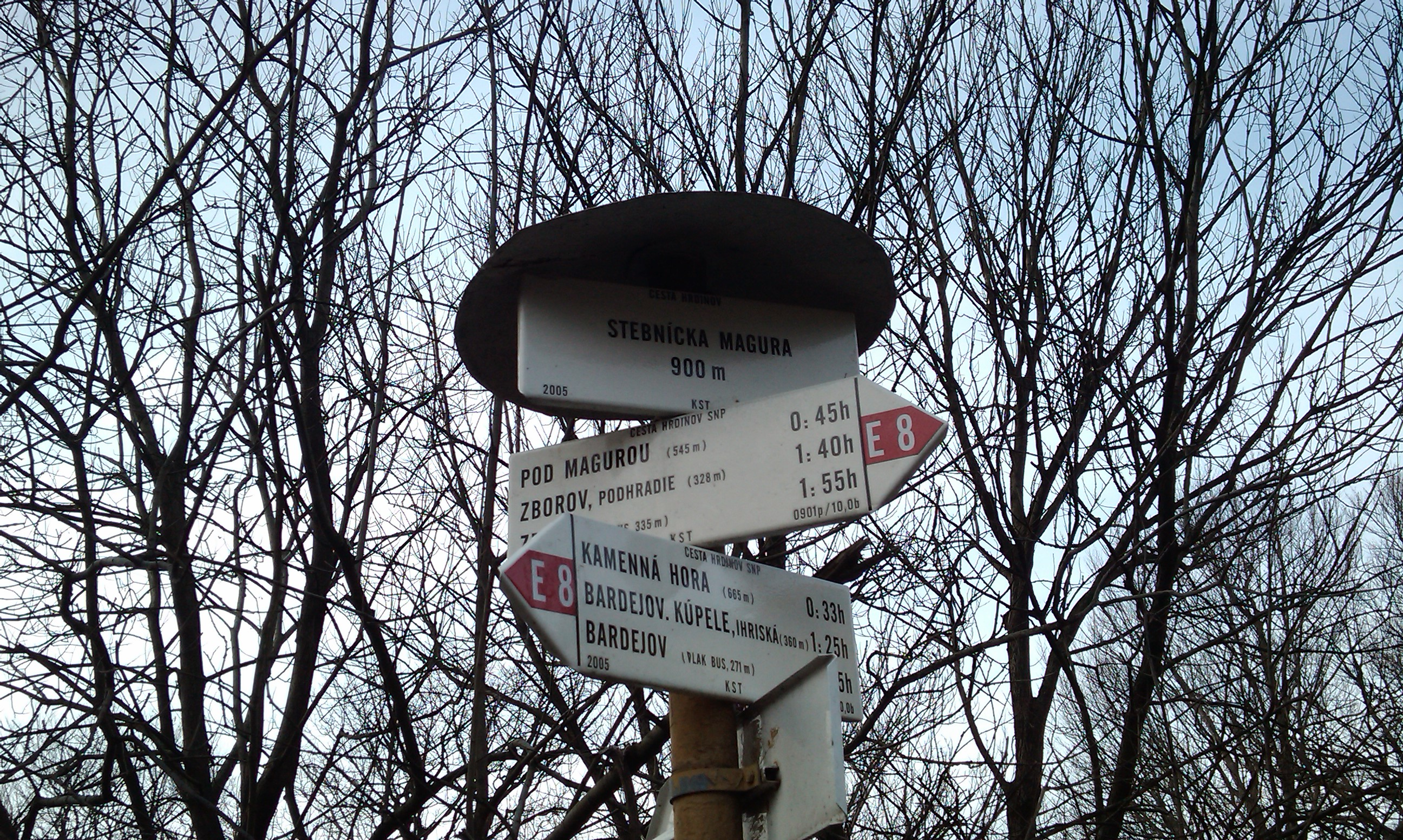 Stebnicka Magura